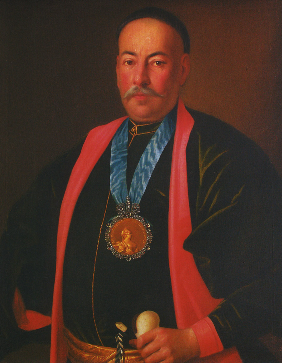 Портрет С. Д. Ефремова Карл-Людвиг Иоганн Христинек Ростовский областной музей изобразительных искусств, Ростов-на-Дону 1768 Холст, масло 90x72. Портрет С. Д. Ефремова был написан в год его награждения за военную службу императрицей Елизаветой Петровной.